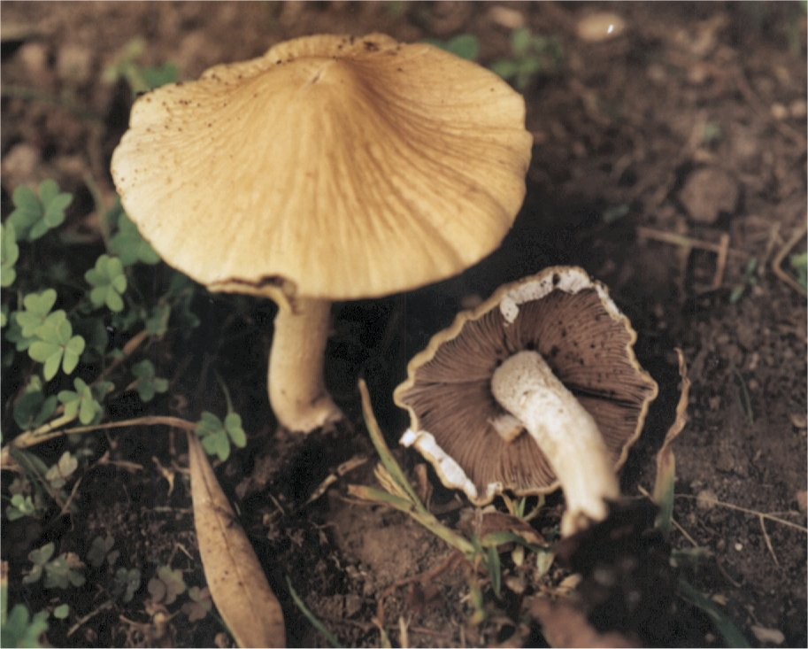 Psathyrella species